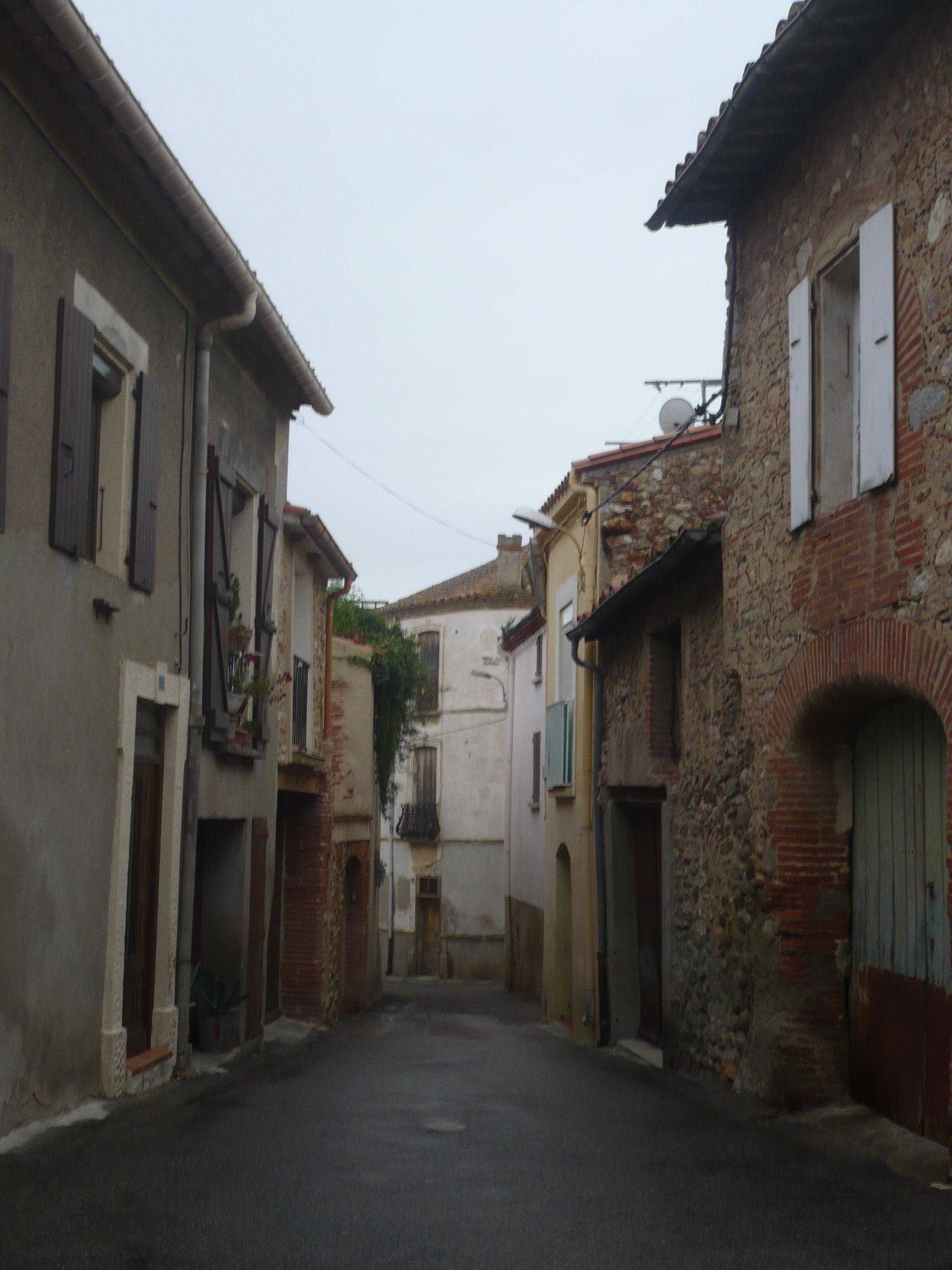 Rue de l'Eglise à Tresserre